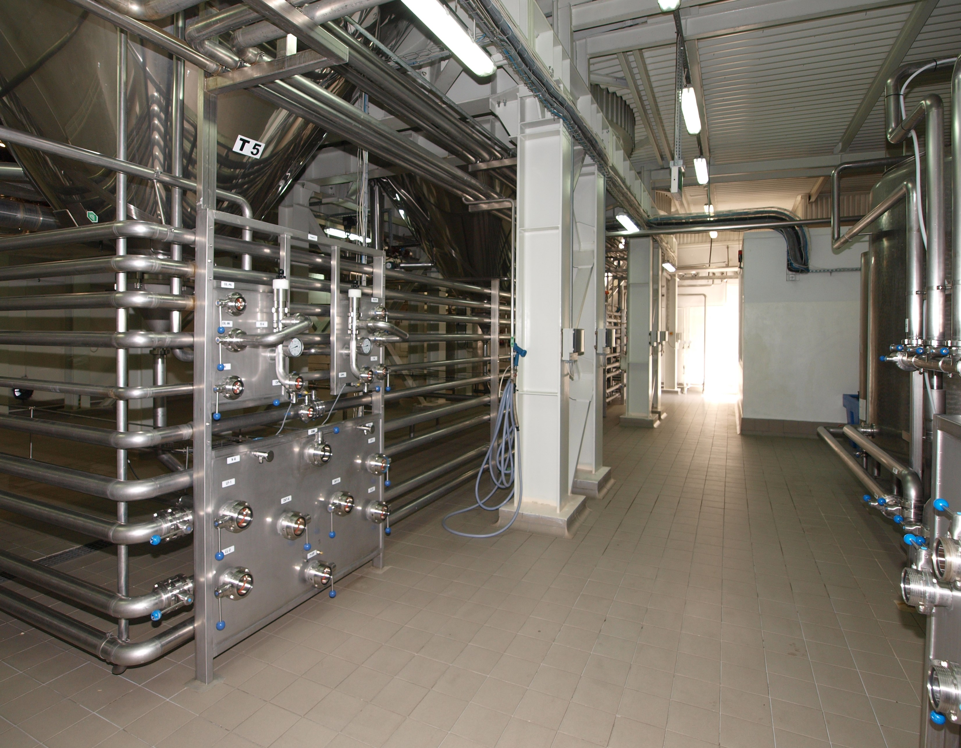 Browary Górnośląskie w Zabrzu. Dolne części tankofermentorów.